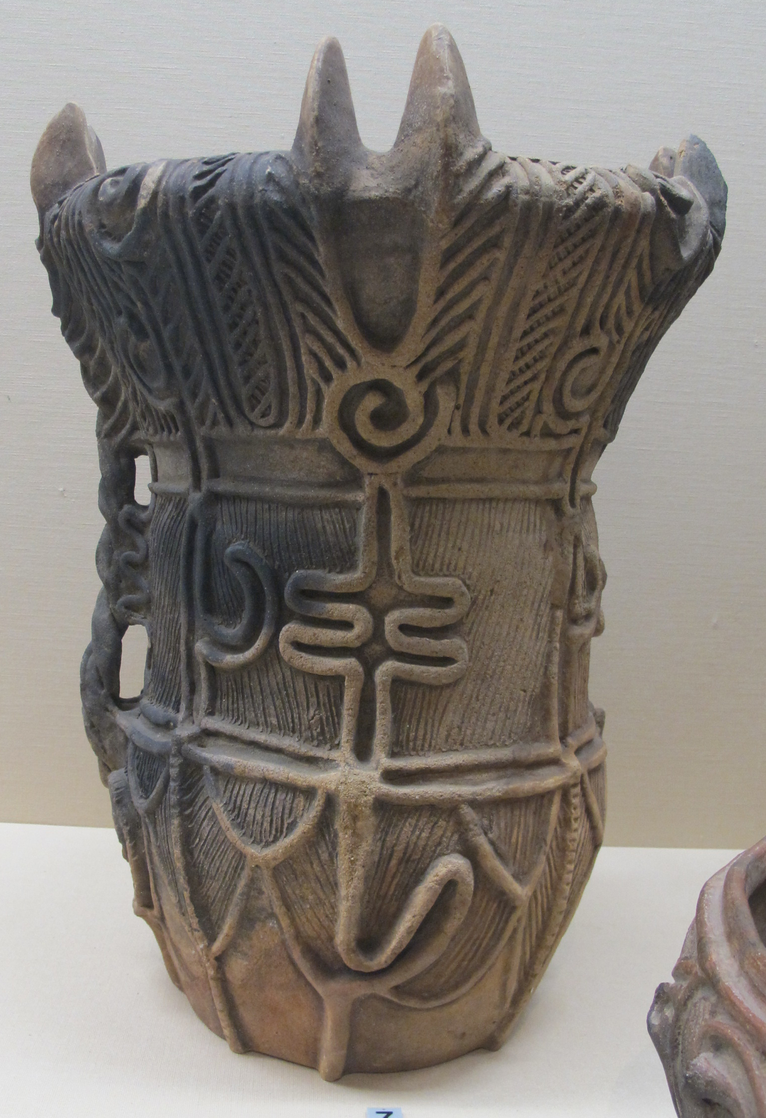 Periodo jomon medio, vasellame